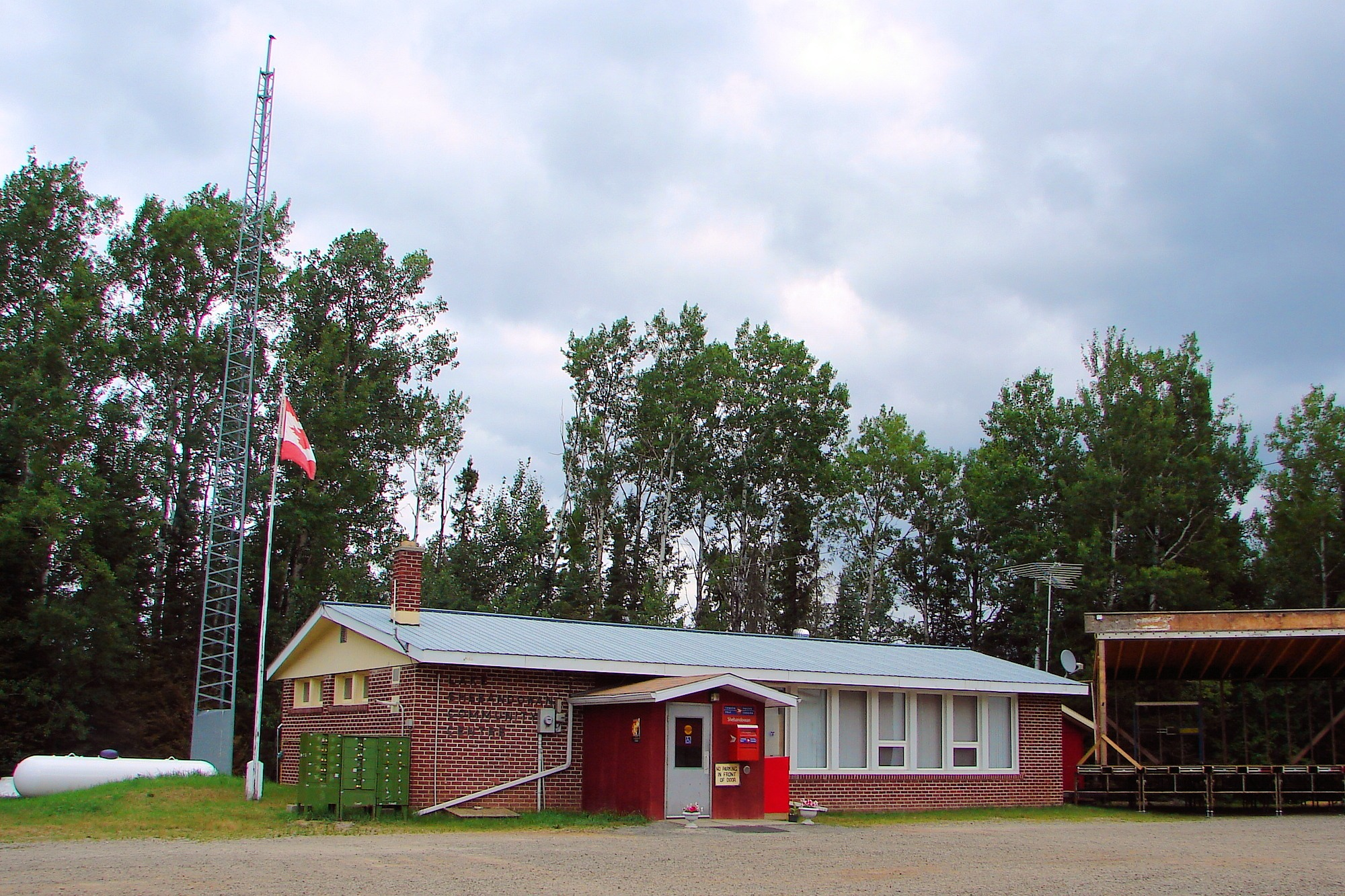 Shebandowan, Ontario, Canada